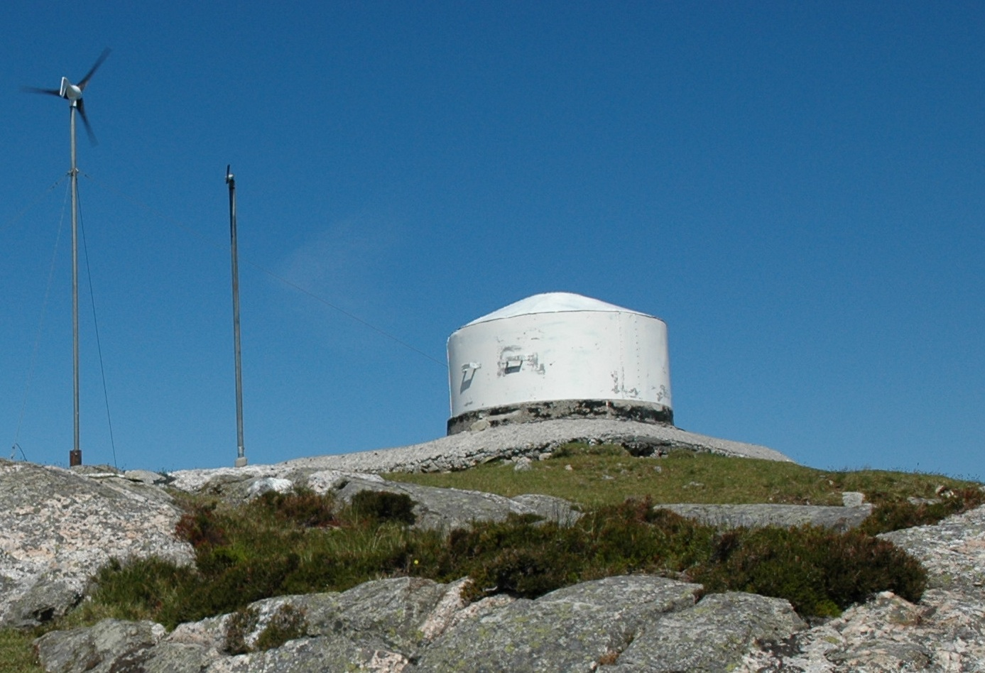 Den kvite hatten på toppen av tyskerbunkeren på Såto.